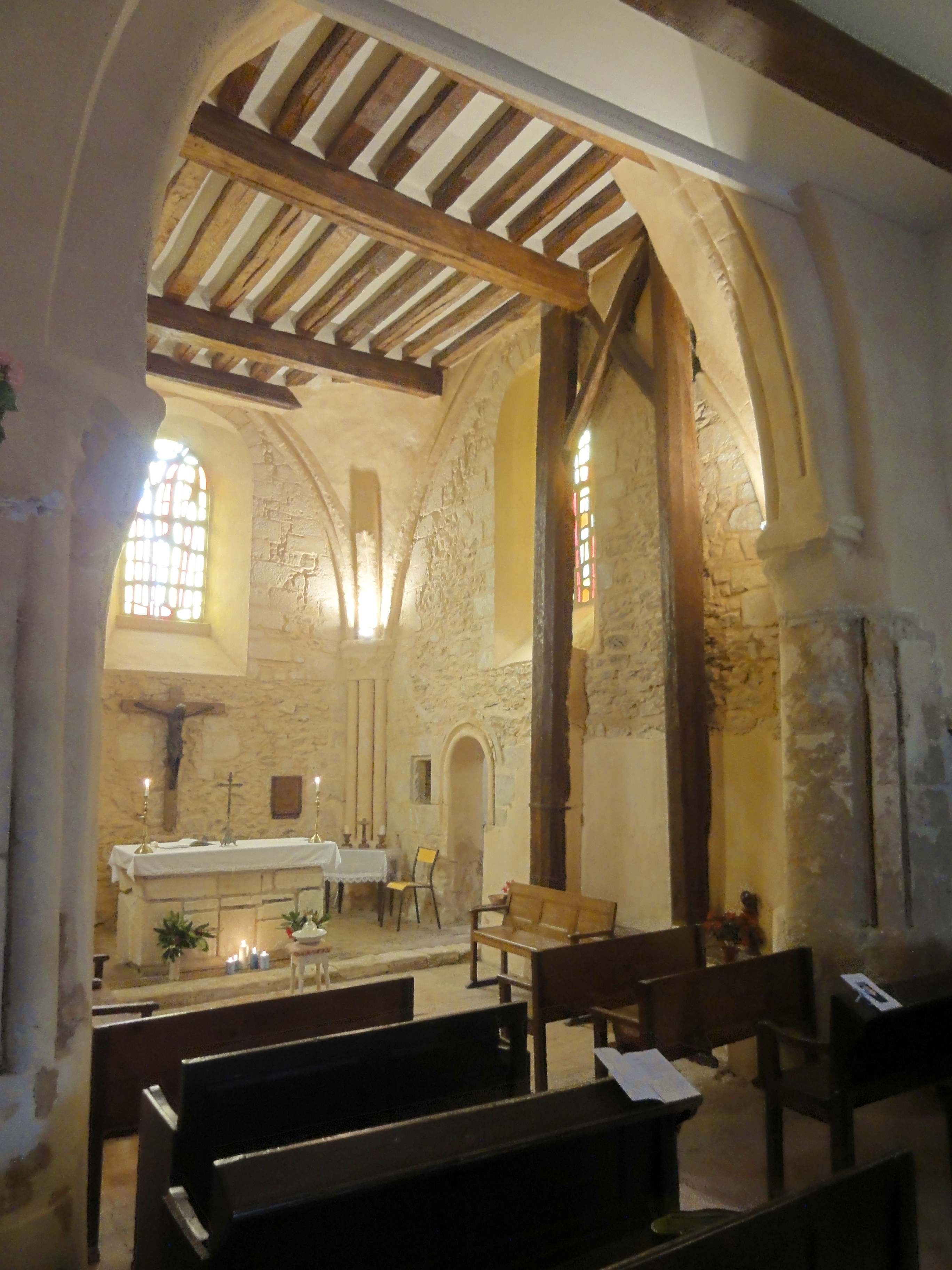 Intérieur de l'église - voir titre.